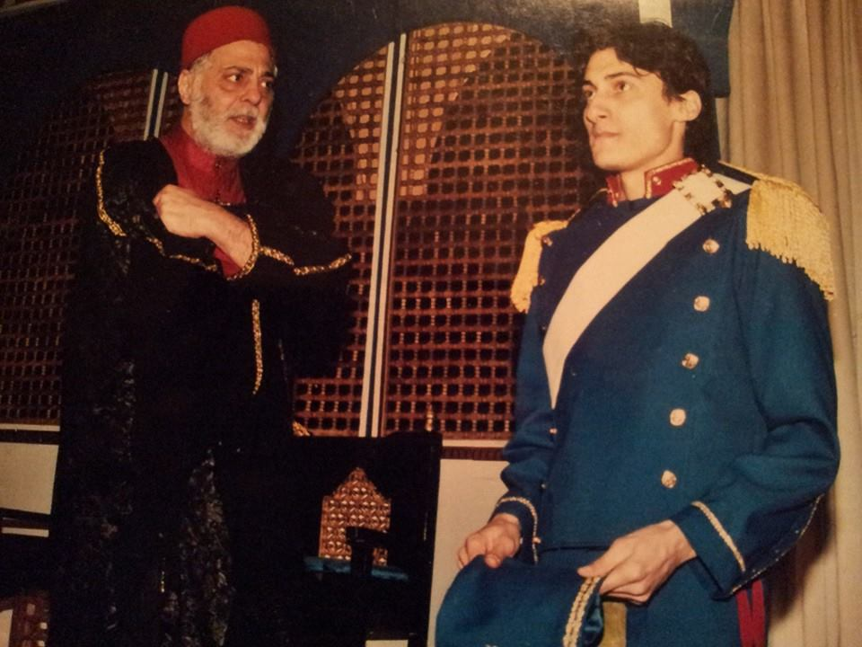 شادى الدالى و الفنان توفيق عبد الحميد فى مسرحيه رجل القلعه